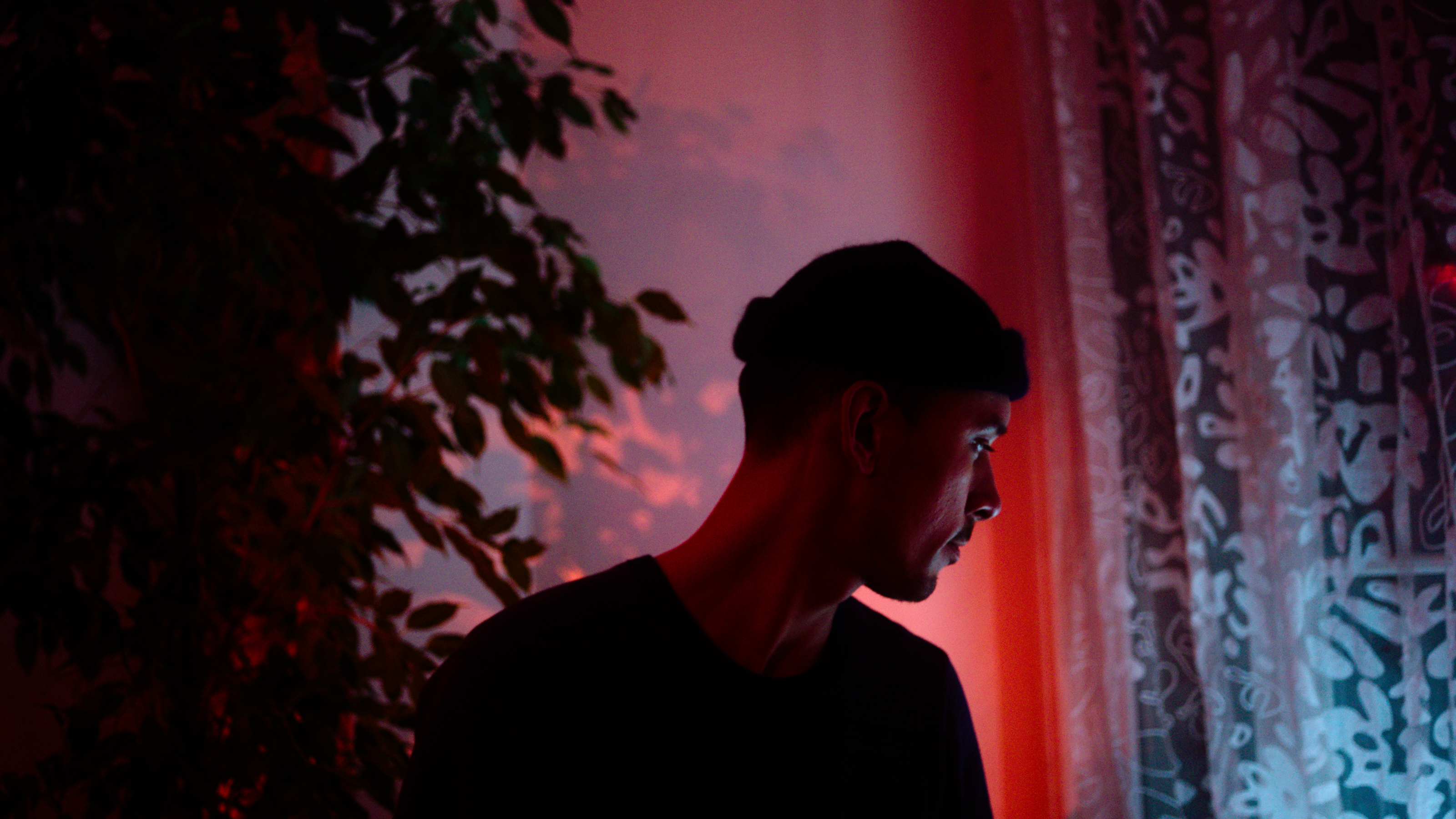 Persfoto Wantigga 2019